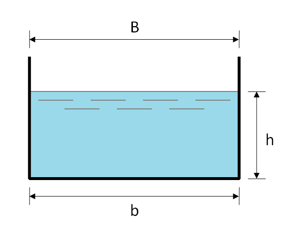 Section d'un canal rectangulaire